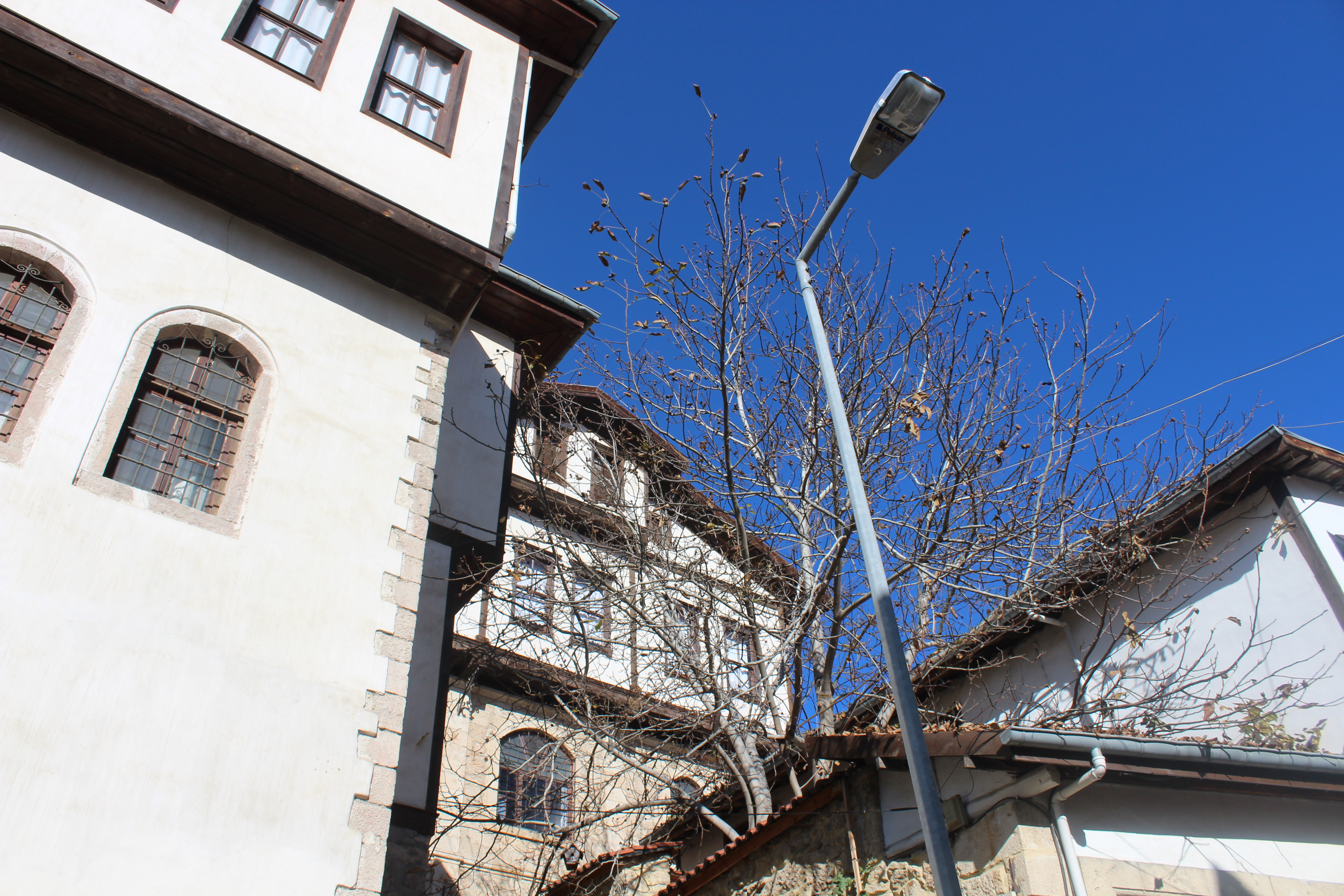 Beypazarı, 2017